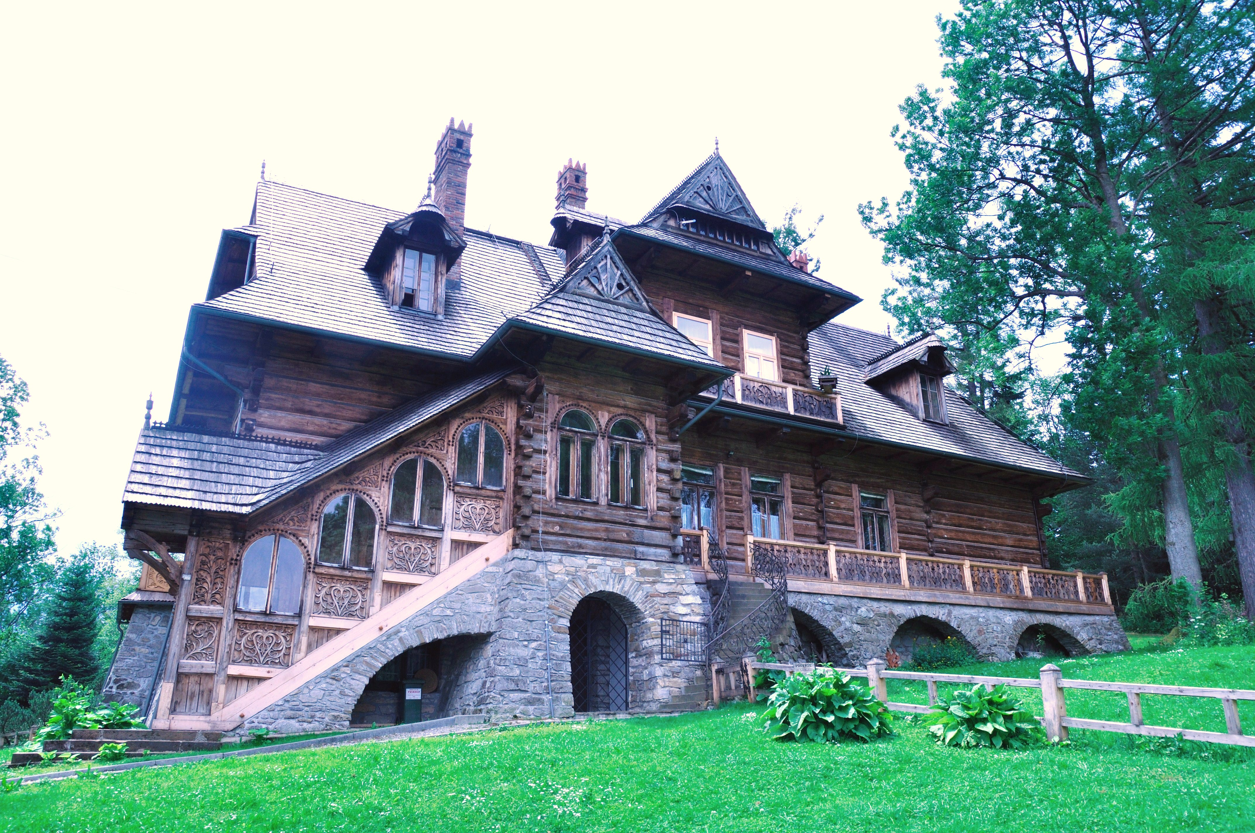 Zakopane, Droga na Koziniec 1, róg Drogi na Antałówkę - Willa Pod Jedlami (strona północna)